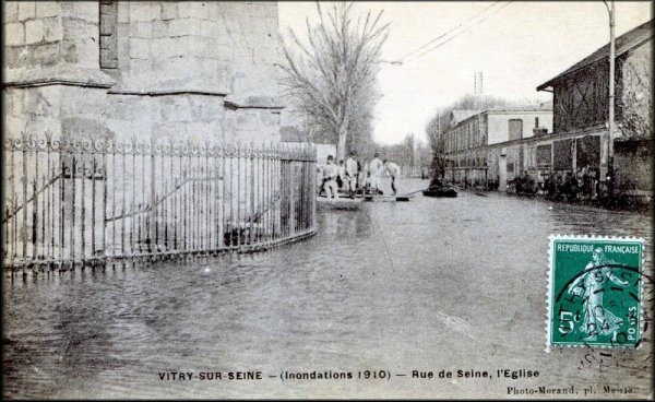 Français cadien: Vue de l'Avenue Paul Vaillant Couturier lors de l'innondation de 1910 depuis l'Eglise de Vitry sur Seine